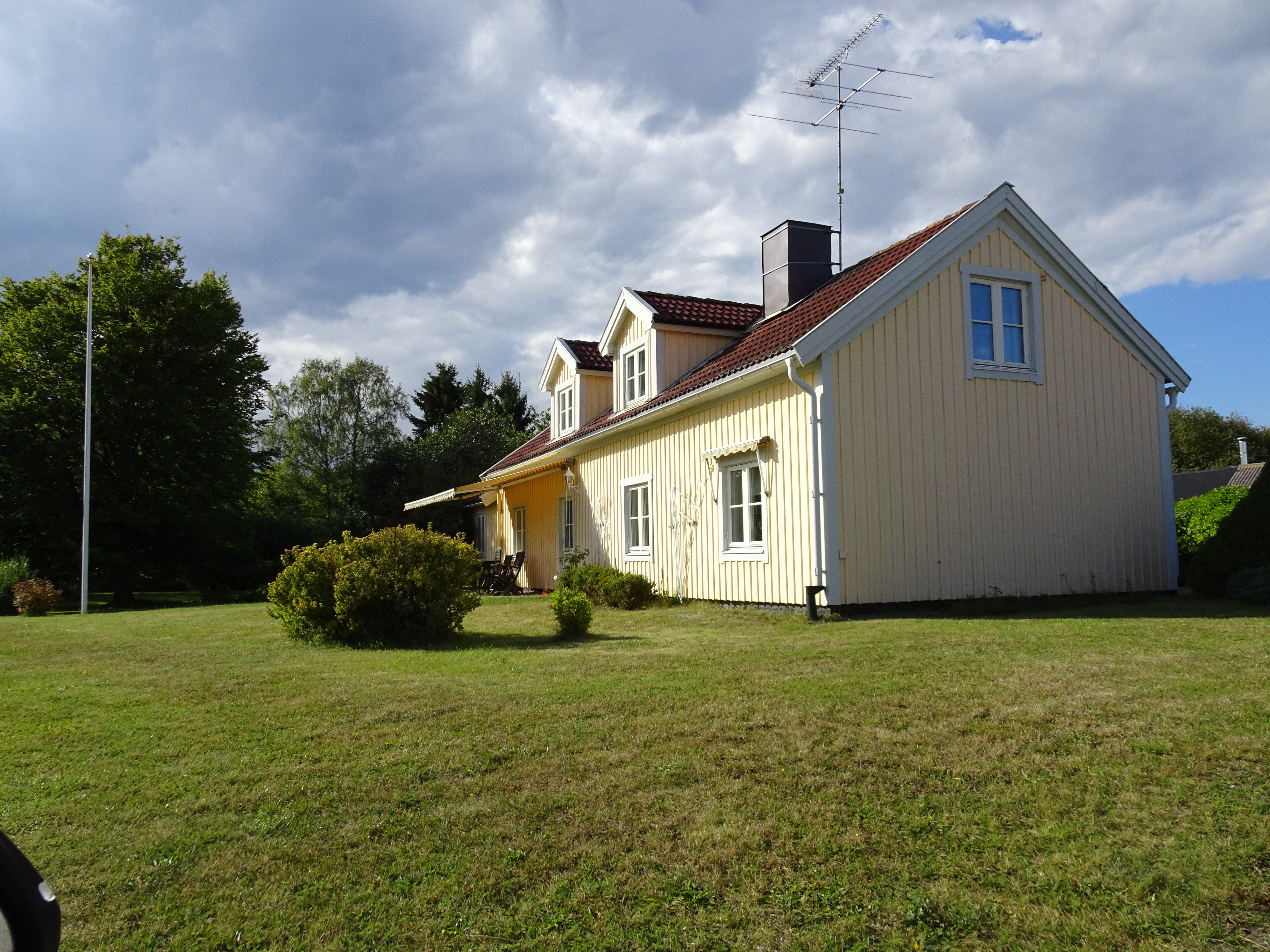 Kunsta på Adelsö